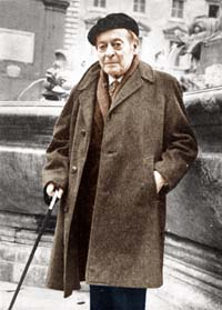 Mario Praz (1896-1982)